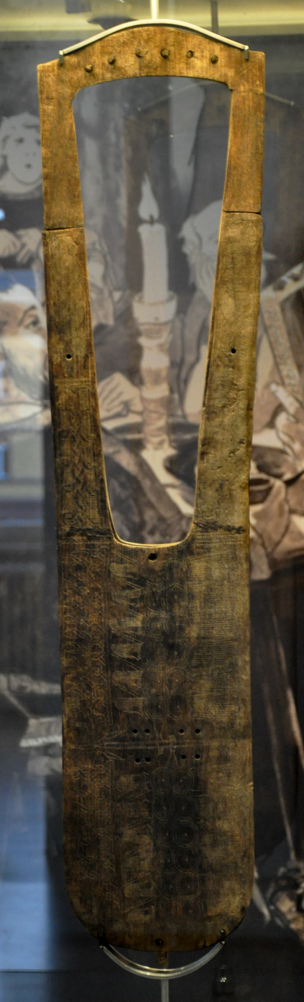 Trossinger Leier, Archäologisches Landesmuseum Baden-Württemberg, Konstanz